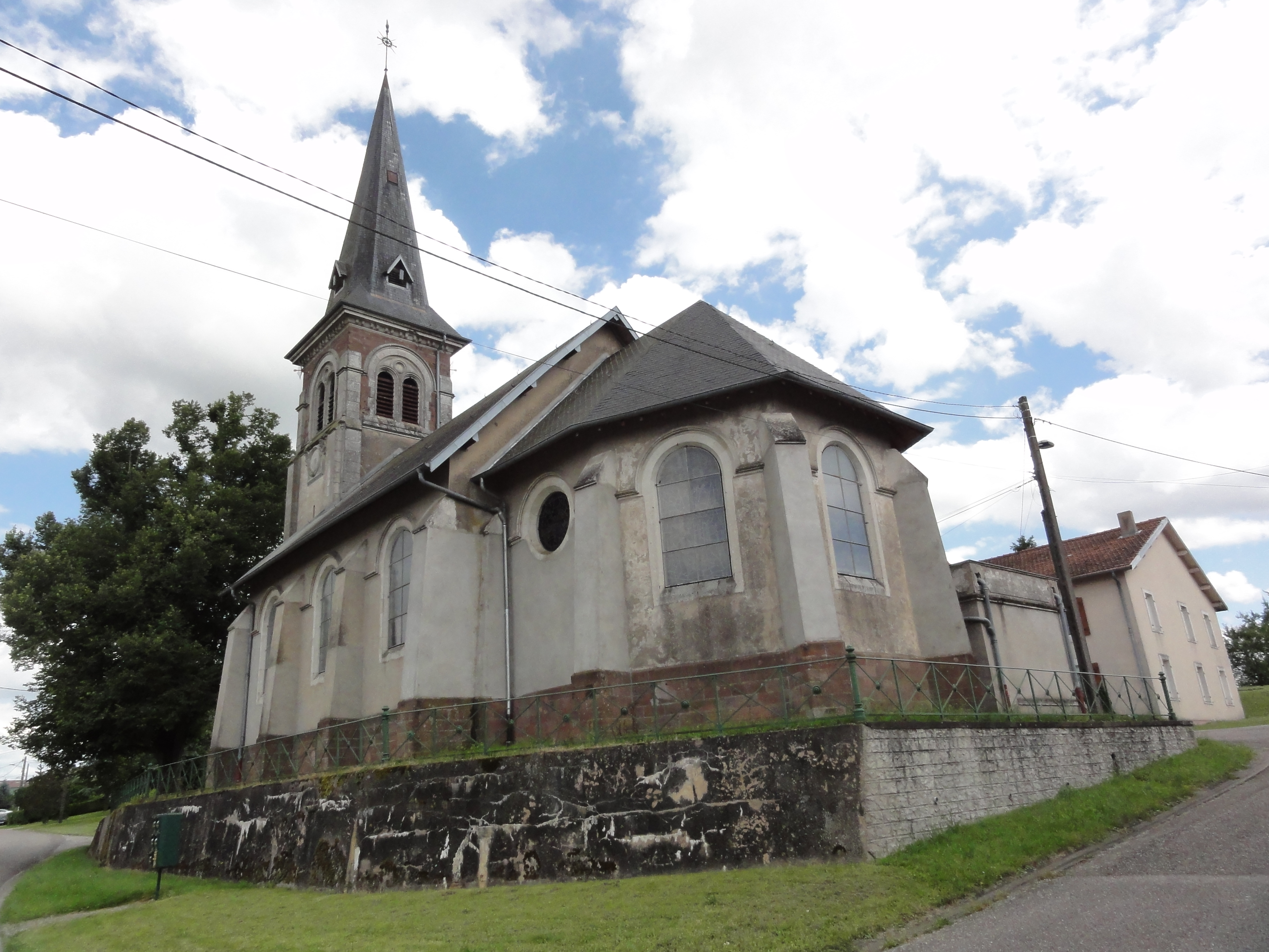 Blémerey (M-et-M) église